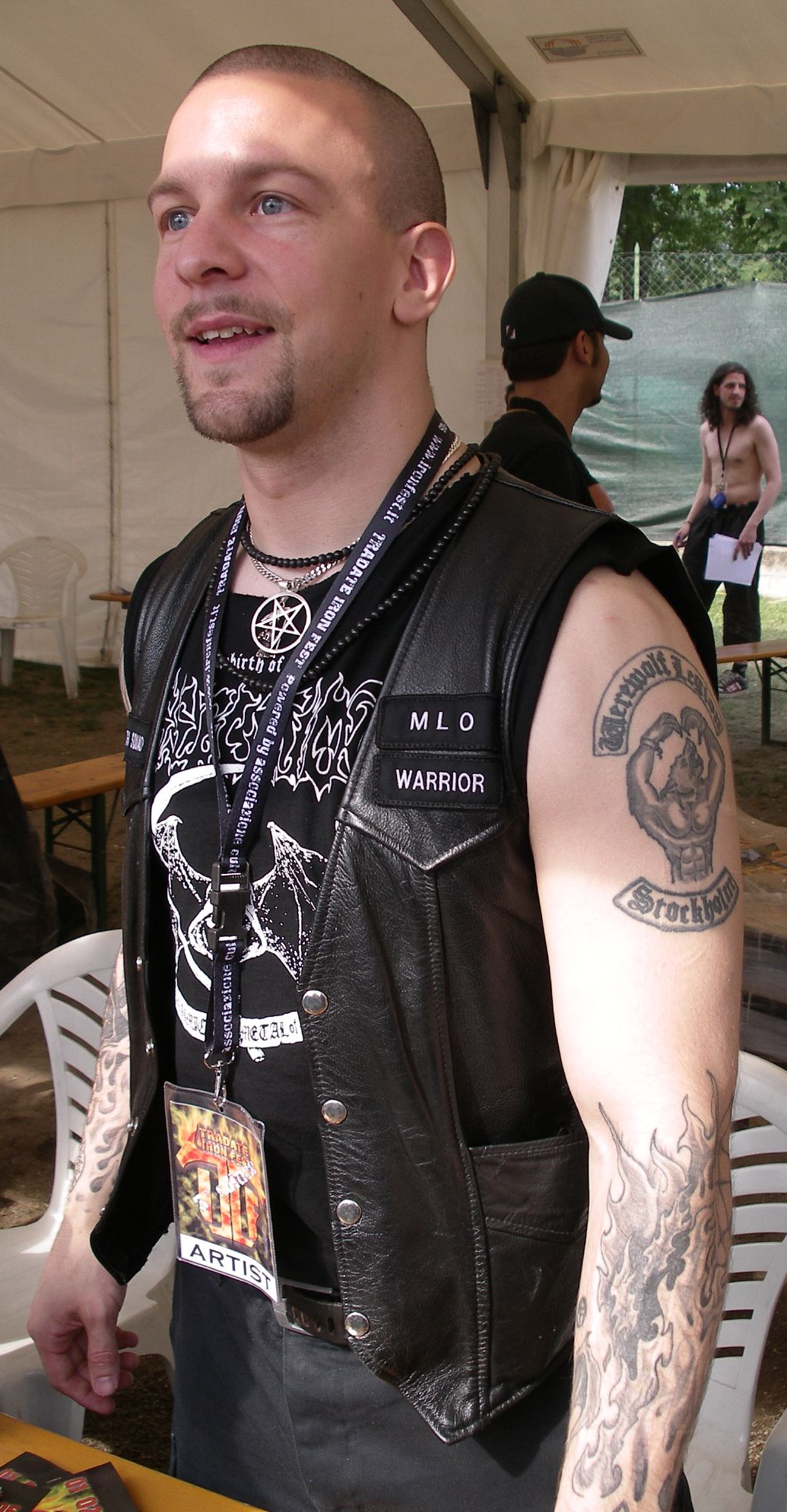 Jon Nödtveidt at a meet and greet in 2005.